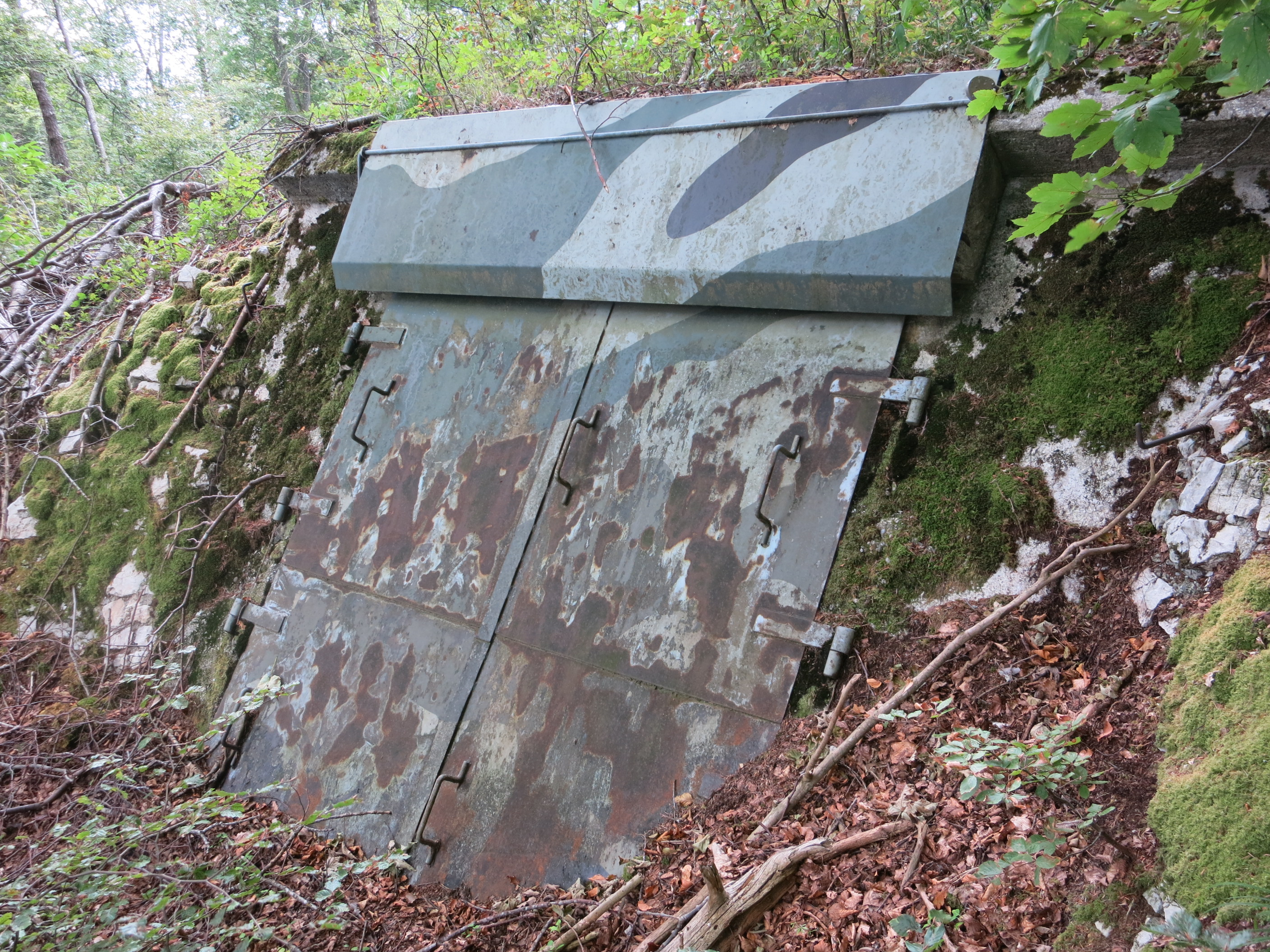 Artilleriestellung Gsal, Hauenstein-Ifenthal SO, Schweiz